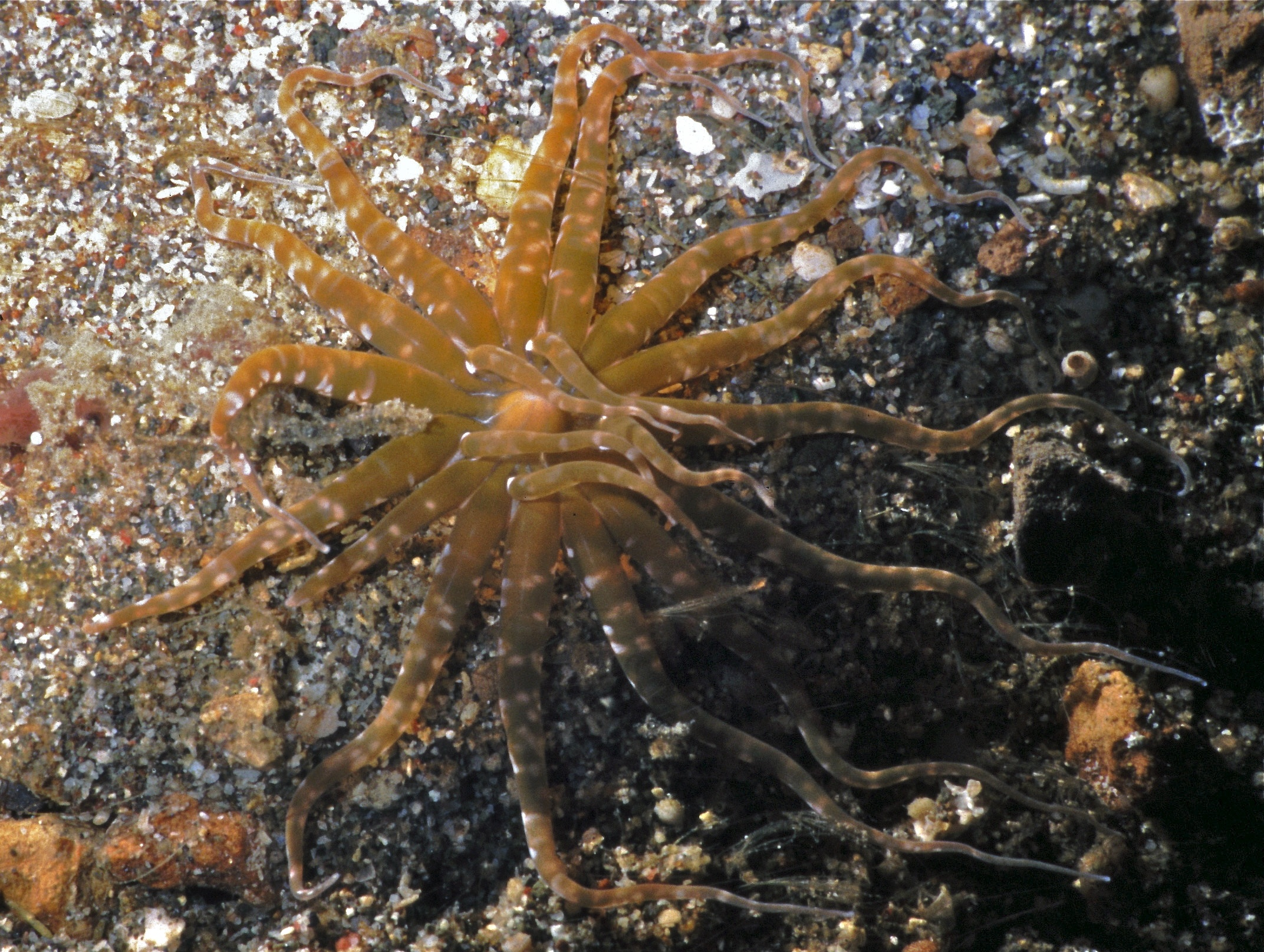 Lembeh Strait, Sulawesi, INDONESIA